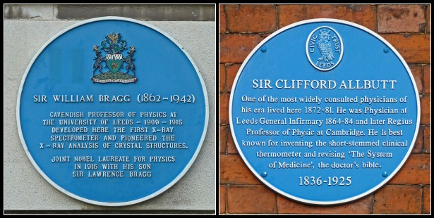 Blue Plaques at Leeds University